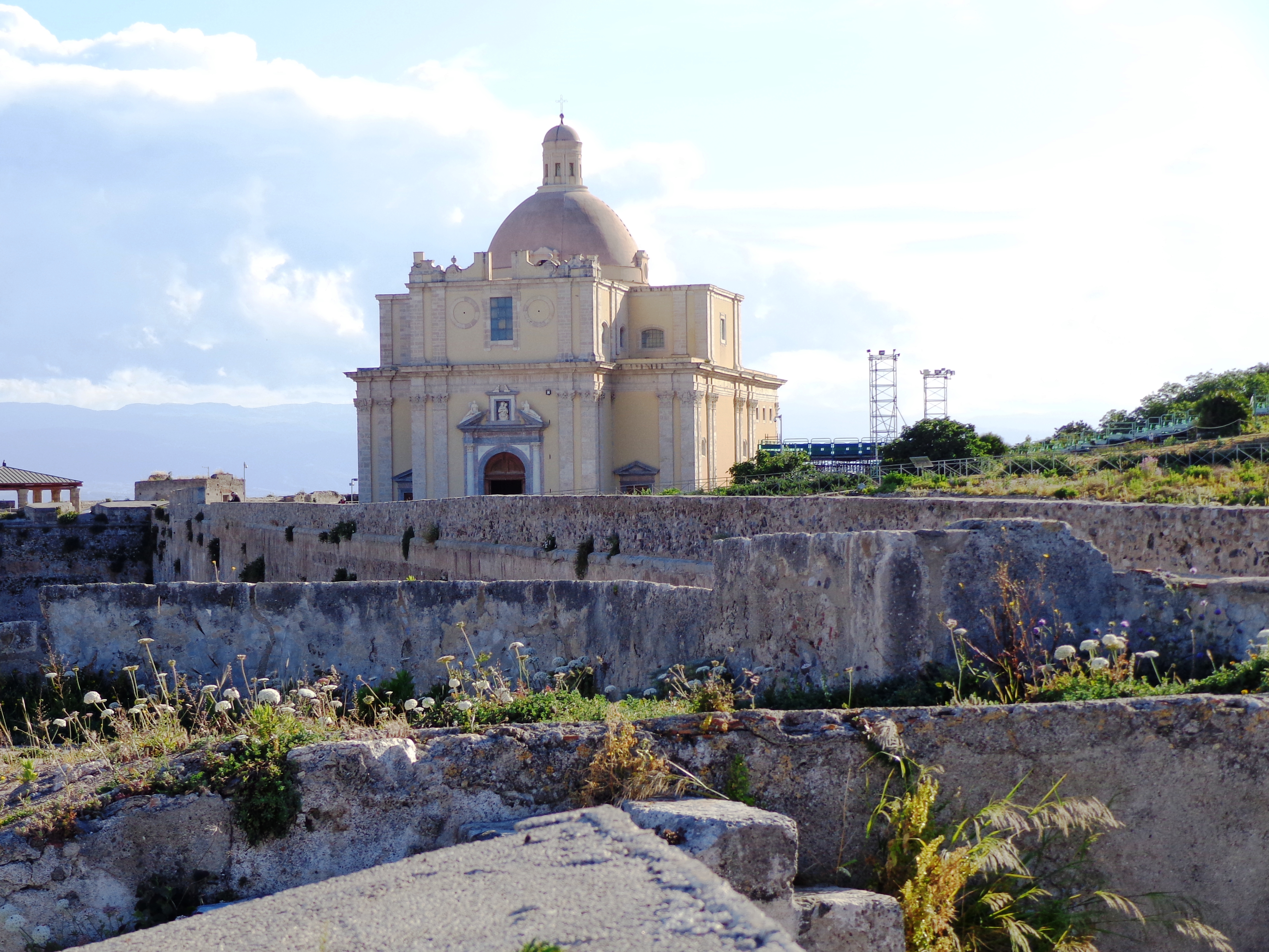 panorama Duomo